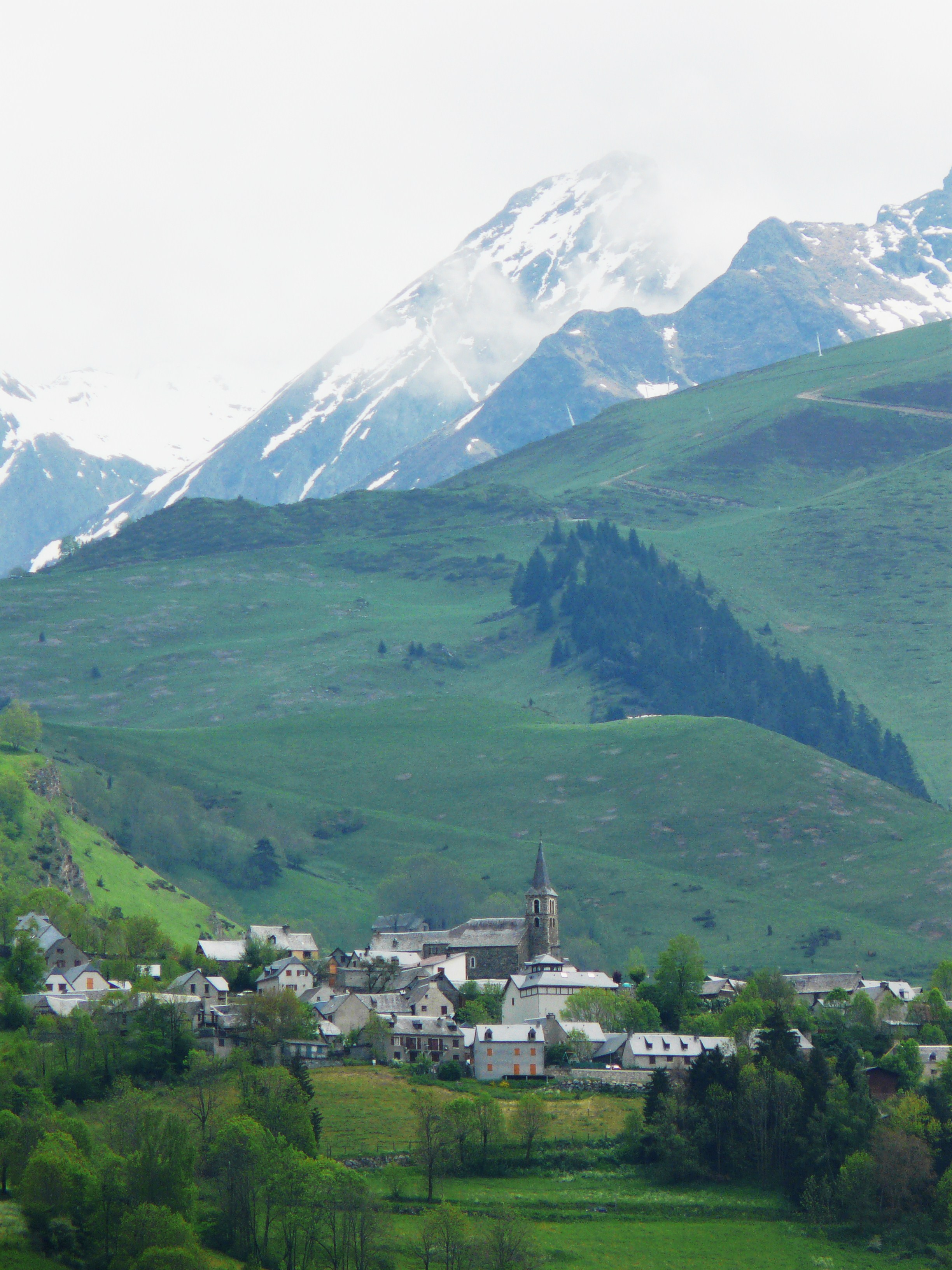 Le village d'Azet, Hautes-Pyrénées, France.